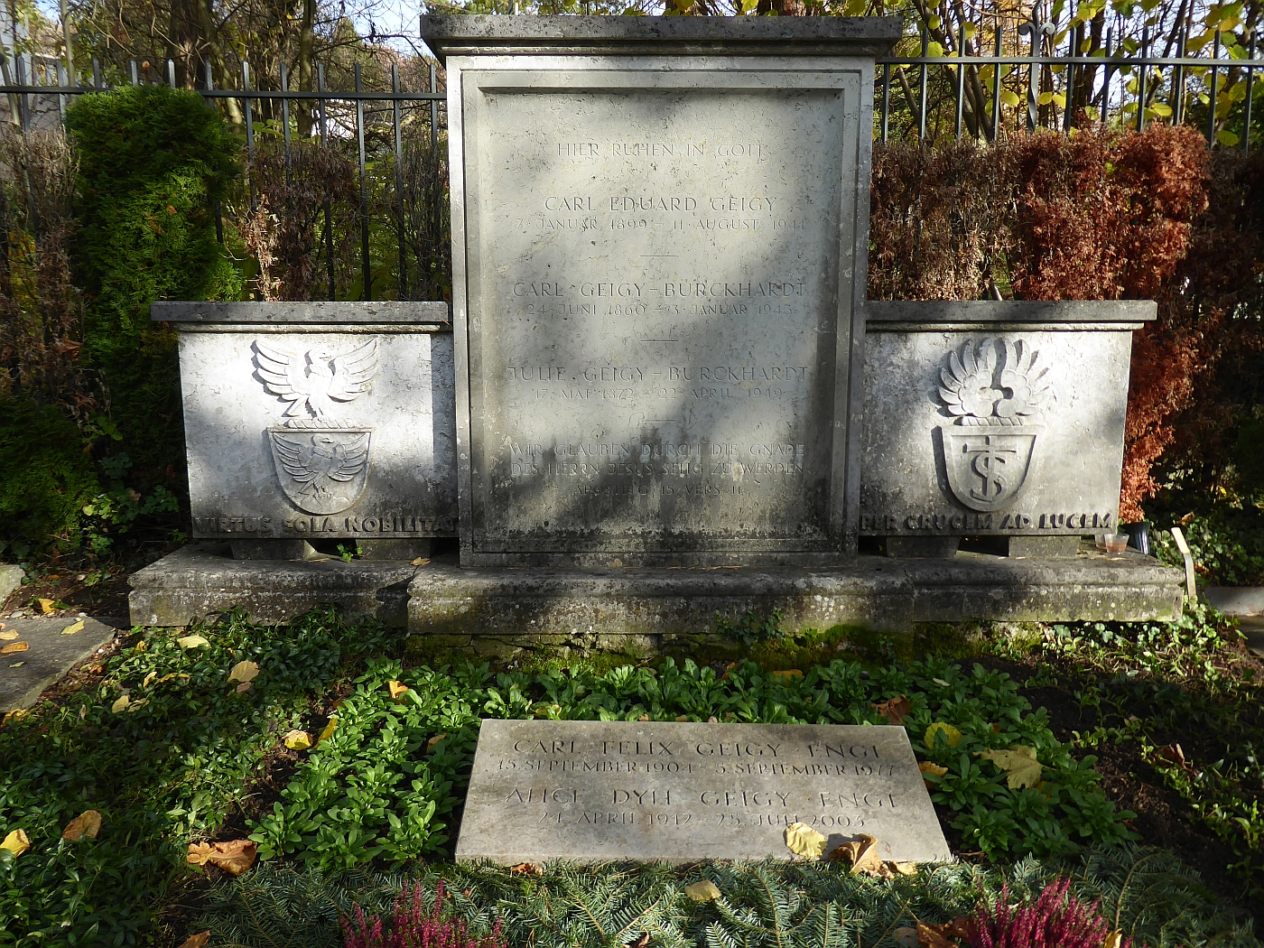 Carl Geigy-Burckhardt (1860–1943) Machineningenieur, Wohltäter, Grab auf dem Friedhof von Münschenstein.